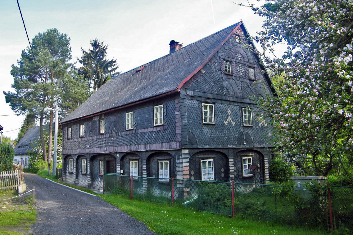 Dům čp. 311 v Mikulášovicích